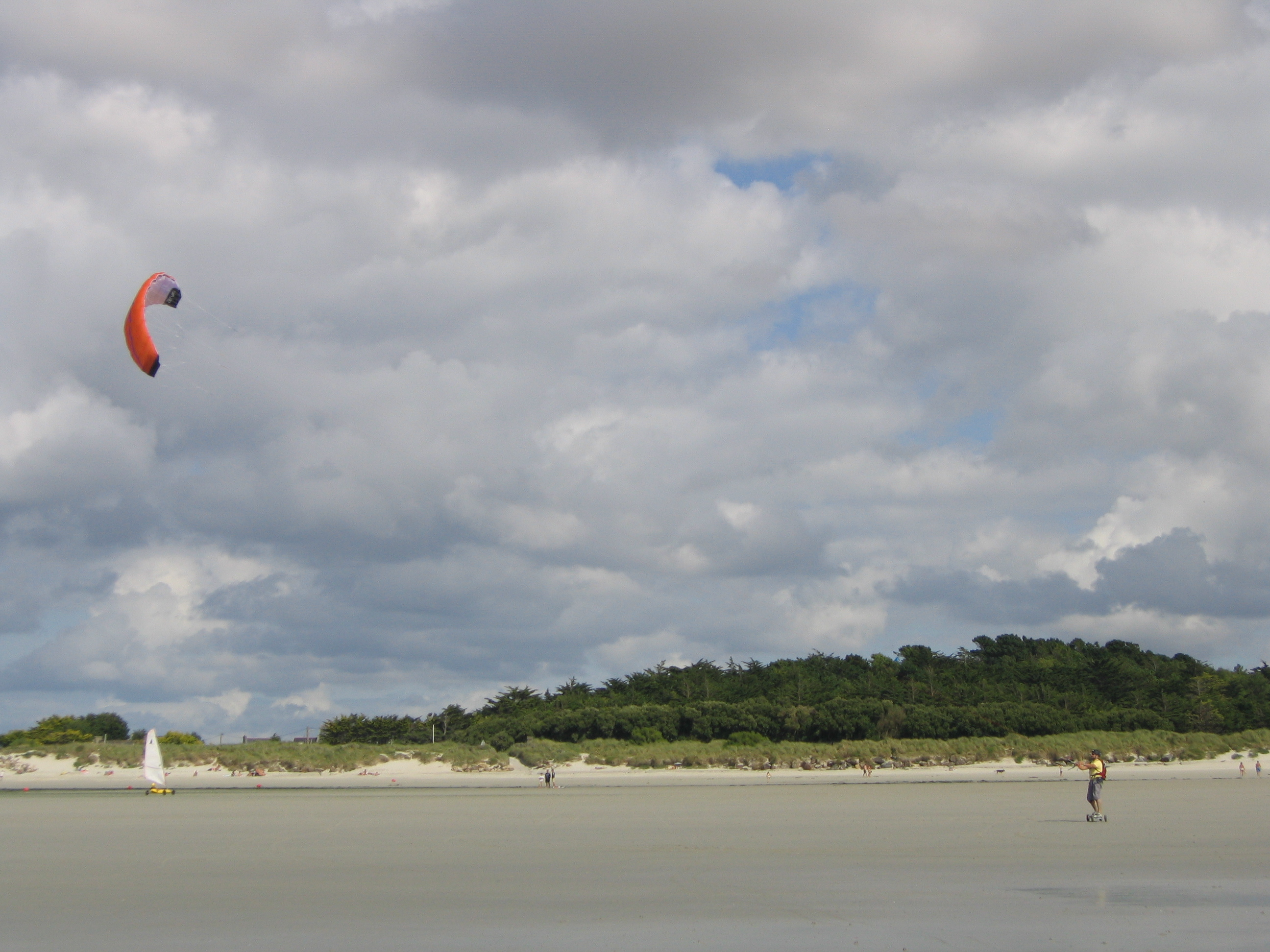 Kite landboarding sur la plage du Dossen à Santec.